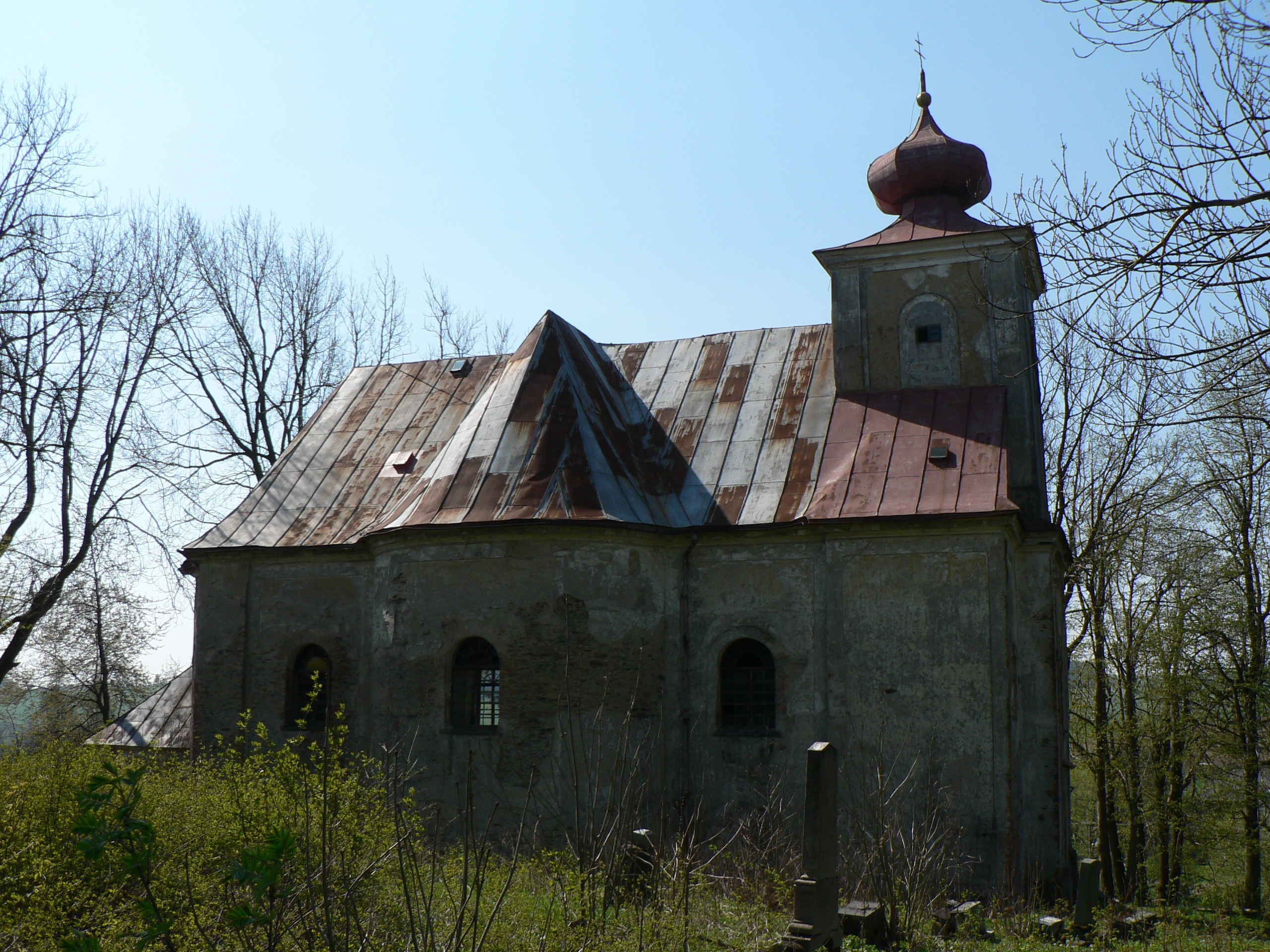 Kostel Nejsvětější Trojice (Albrechtice u Rýmařova)